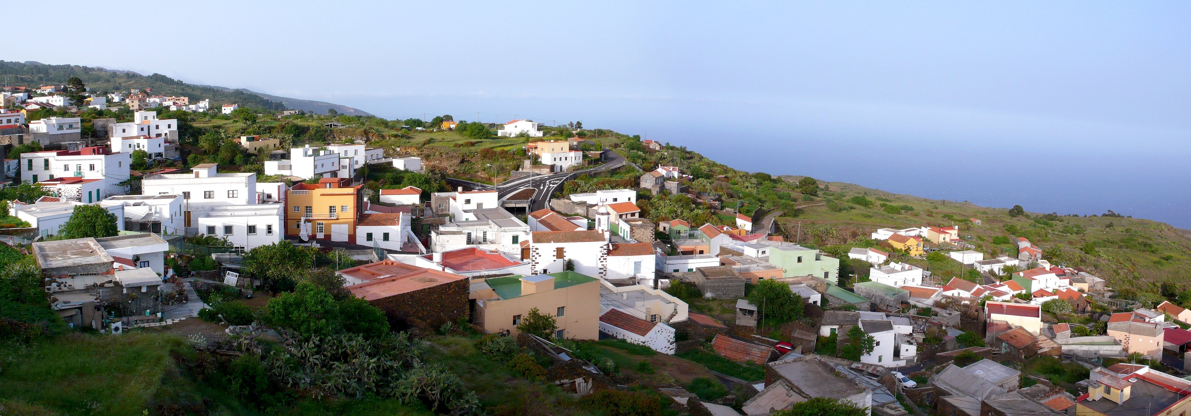 Vista del núcleo de El Pinar